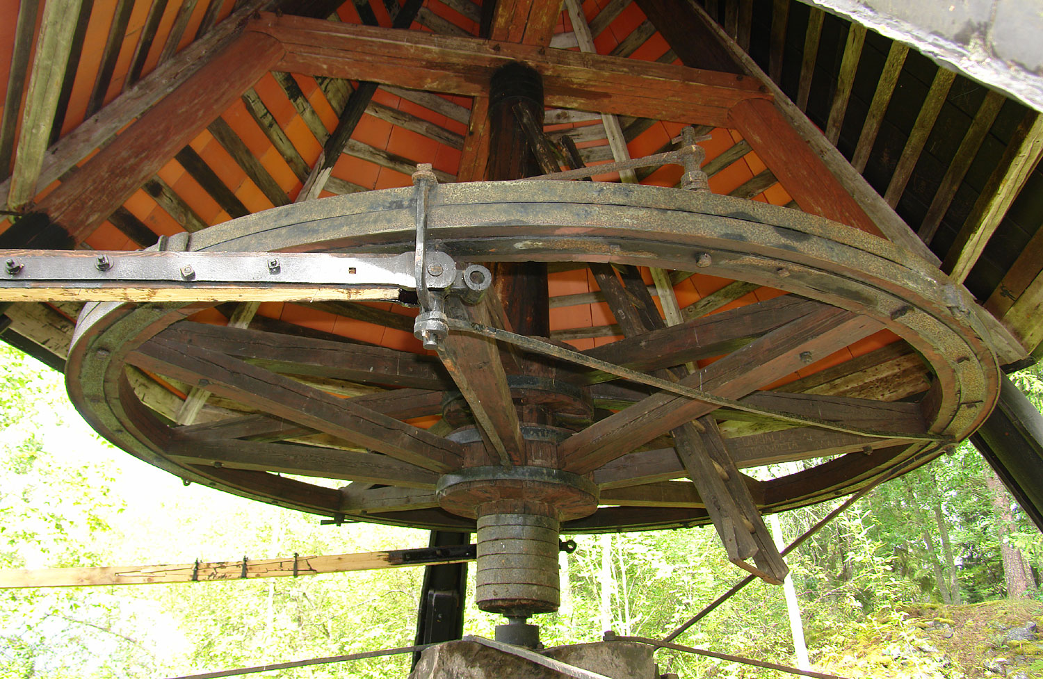 Das Polhemsrad (Polhemshjulet) ist ein Wasserrad, das in der schwedischen Bergwerksregion Bergslagen (nahe Norberg) von 1876 bis 1920 Teil eines Antriebsystems zur Entwässerung von Erzgruben war. Foto: Radkranz des Wendepunktes